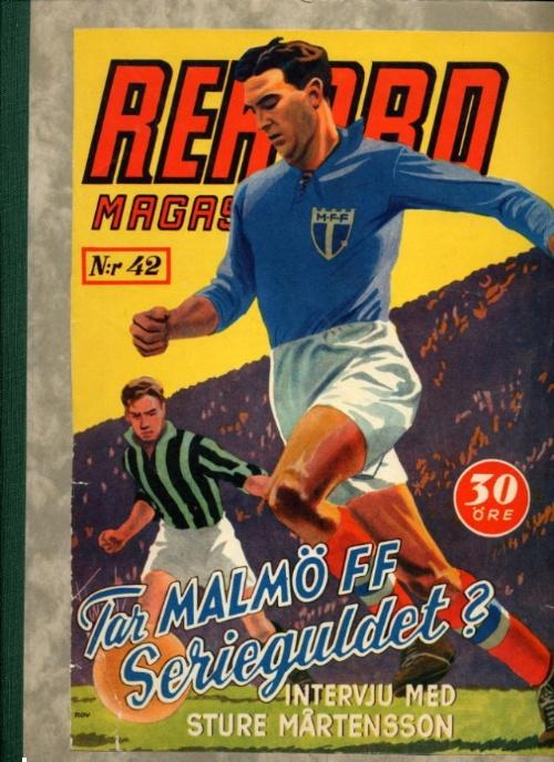 Sture Mårtensson Malmö FF, 1944. Färglagt fotografi. Omslagsbild Rekordmagasinet.